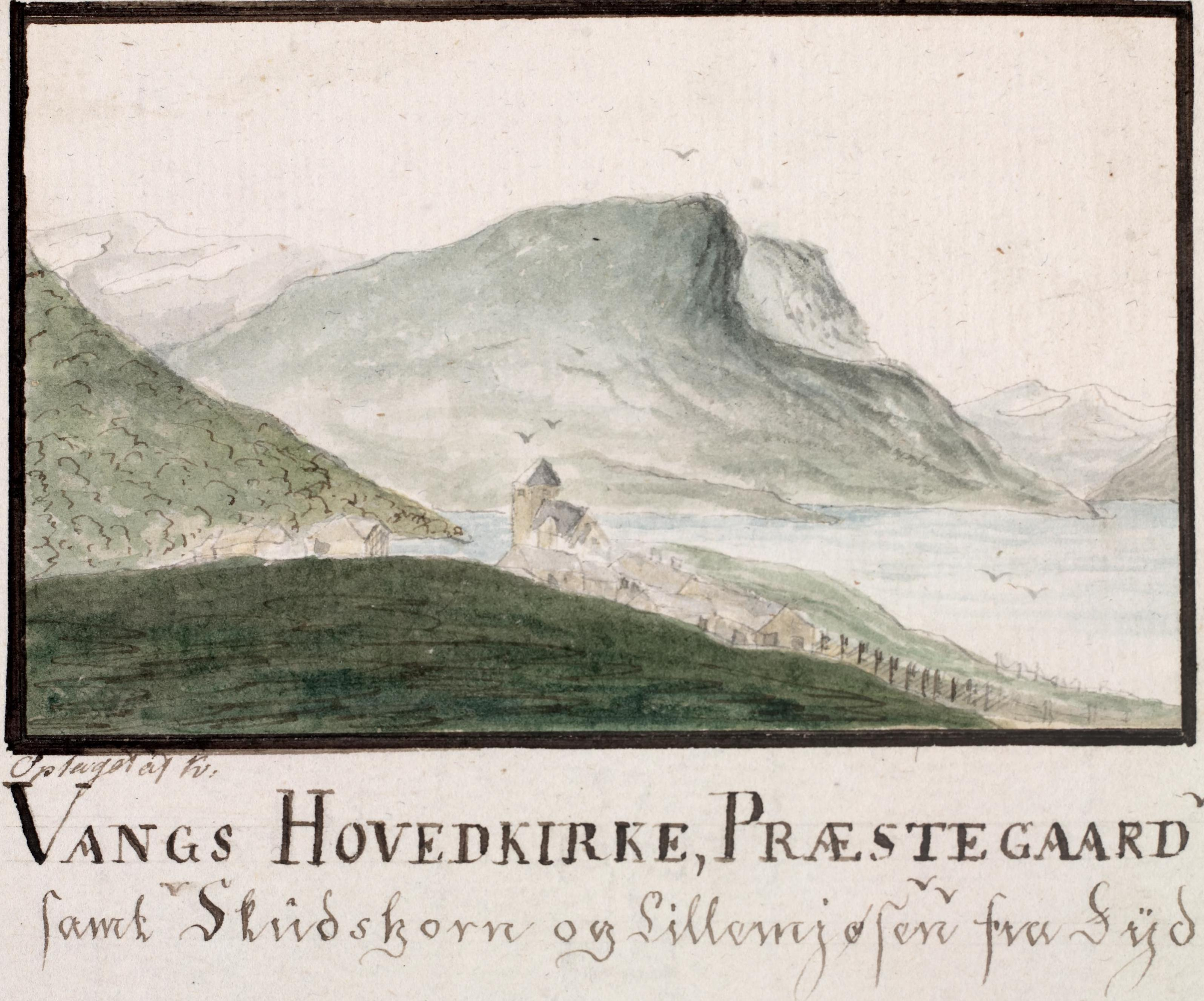 Illustrasjon hentet fra et privatarkiv i Nasjonalbiblioteket med tittelen "Erindring af Fjeldreisen i 1820" av Baltazar Mathias Keilhau